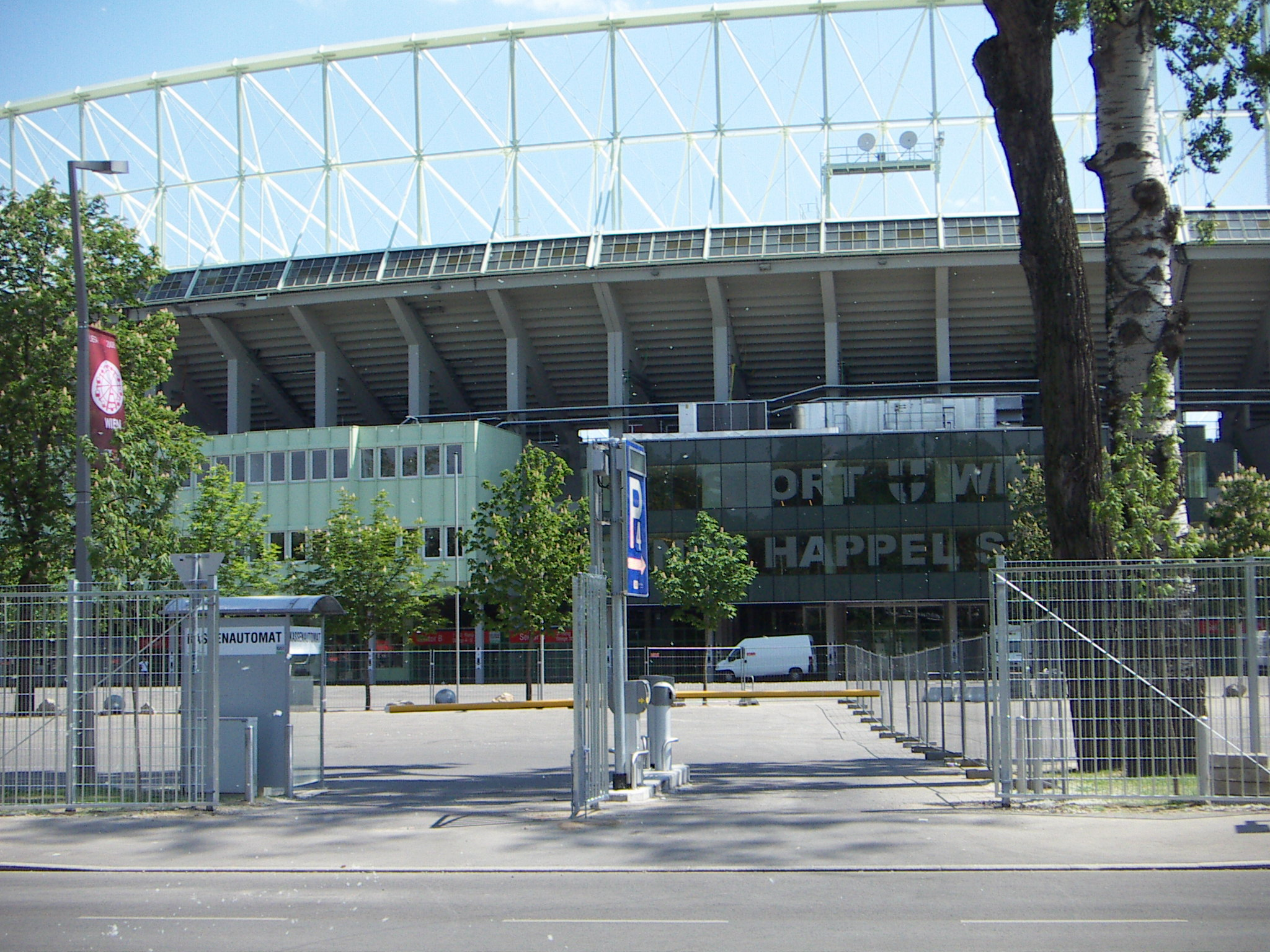 Ernst Happel Stadion, Vienna